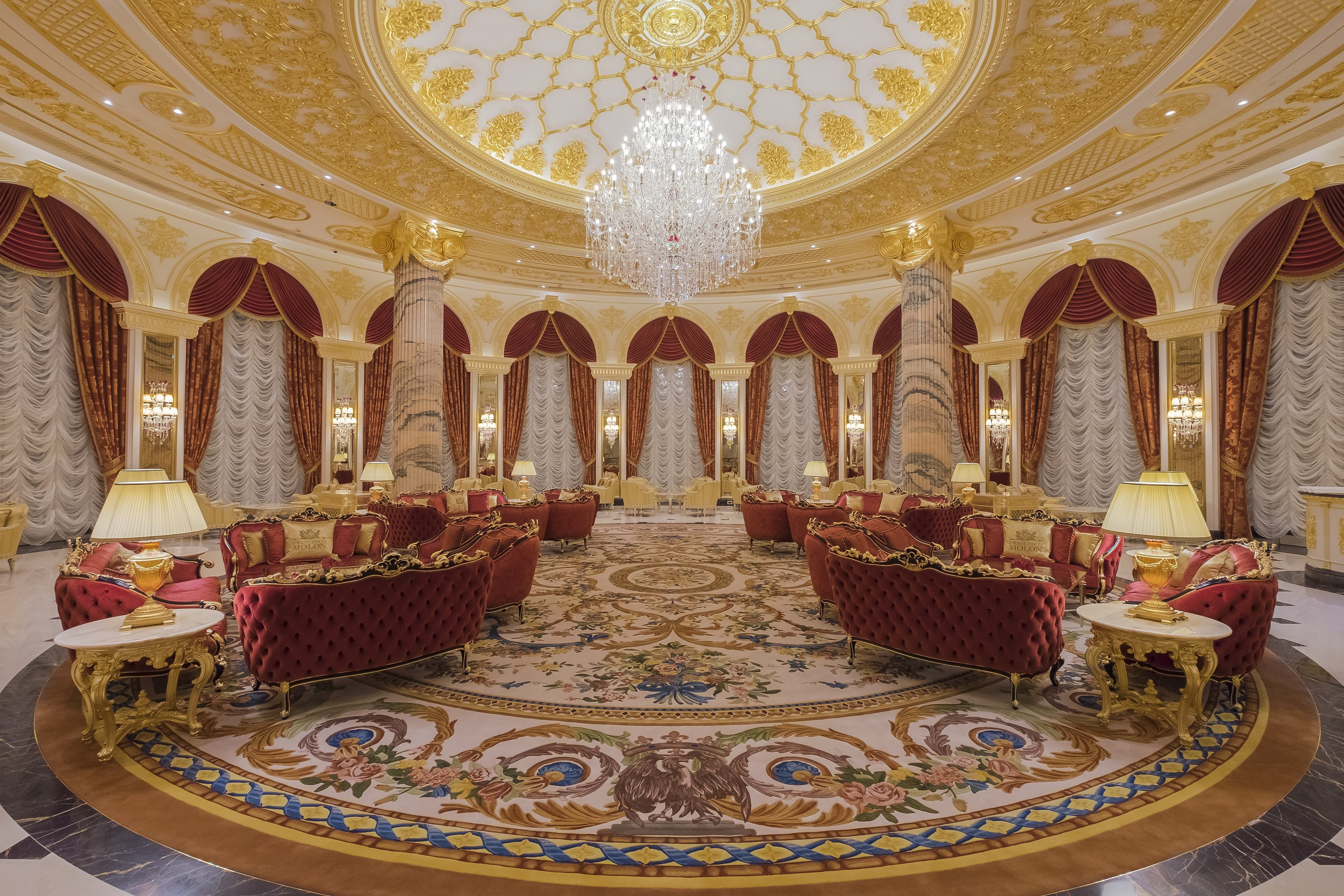 Էմերալդ Կեմպինսկի սպասասրահ՝ պատված 24 կարատ մաքրության ոսկյա ձուլակտորներով։